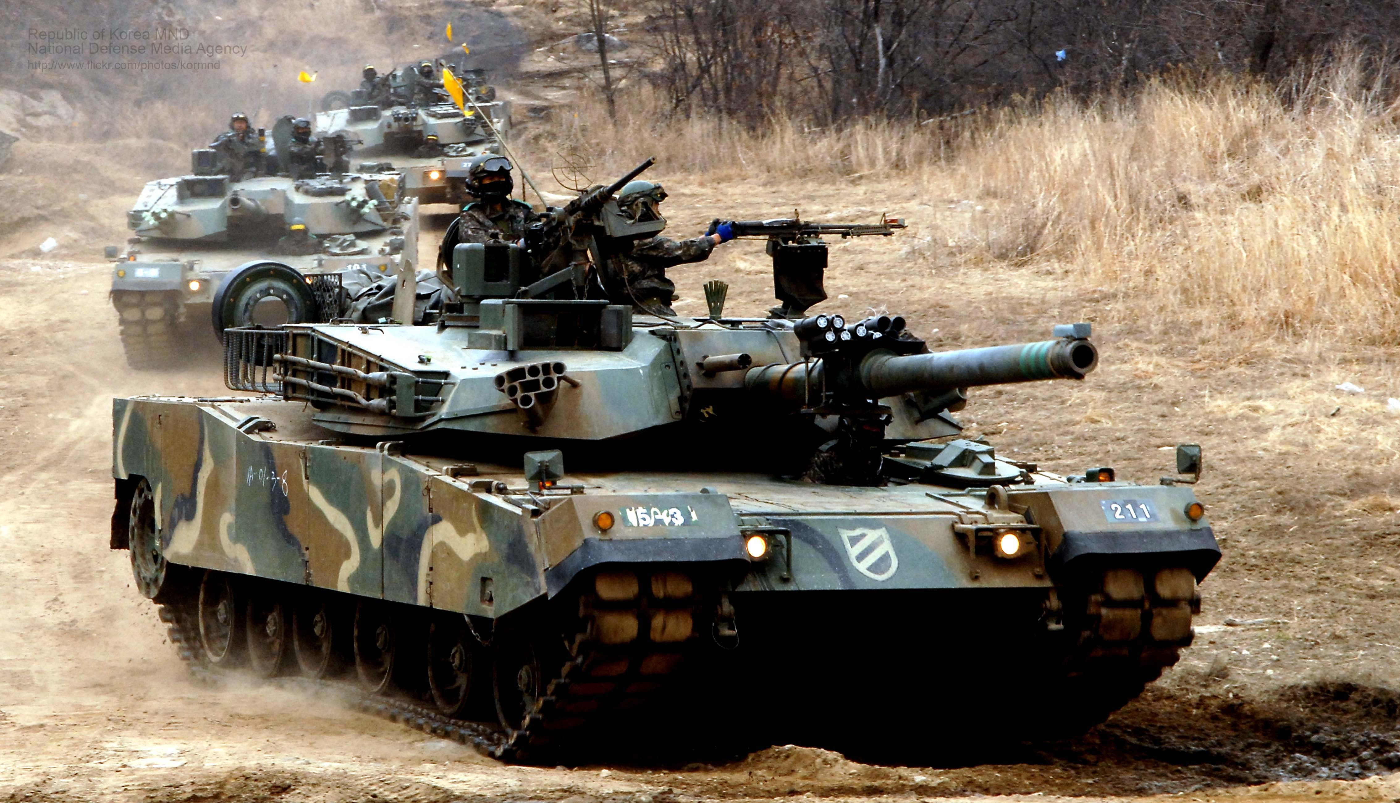 육군 11사단의 대규모 야외기동 전술훈련에서 K-1전차가 신속하게 기동하고 있다. 촬영 - 이헌구 기자